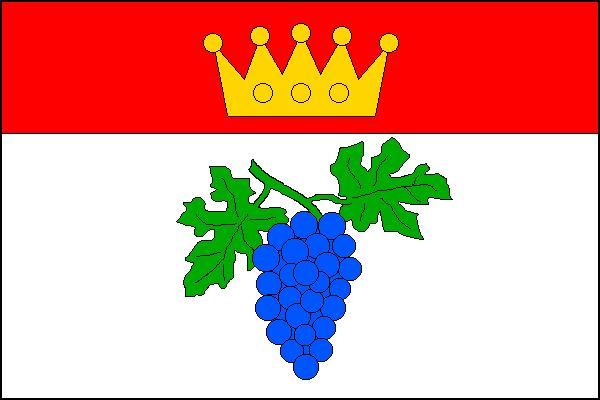 Vlajka obce Čučice